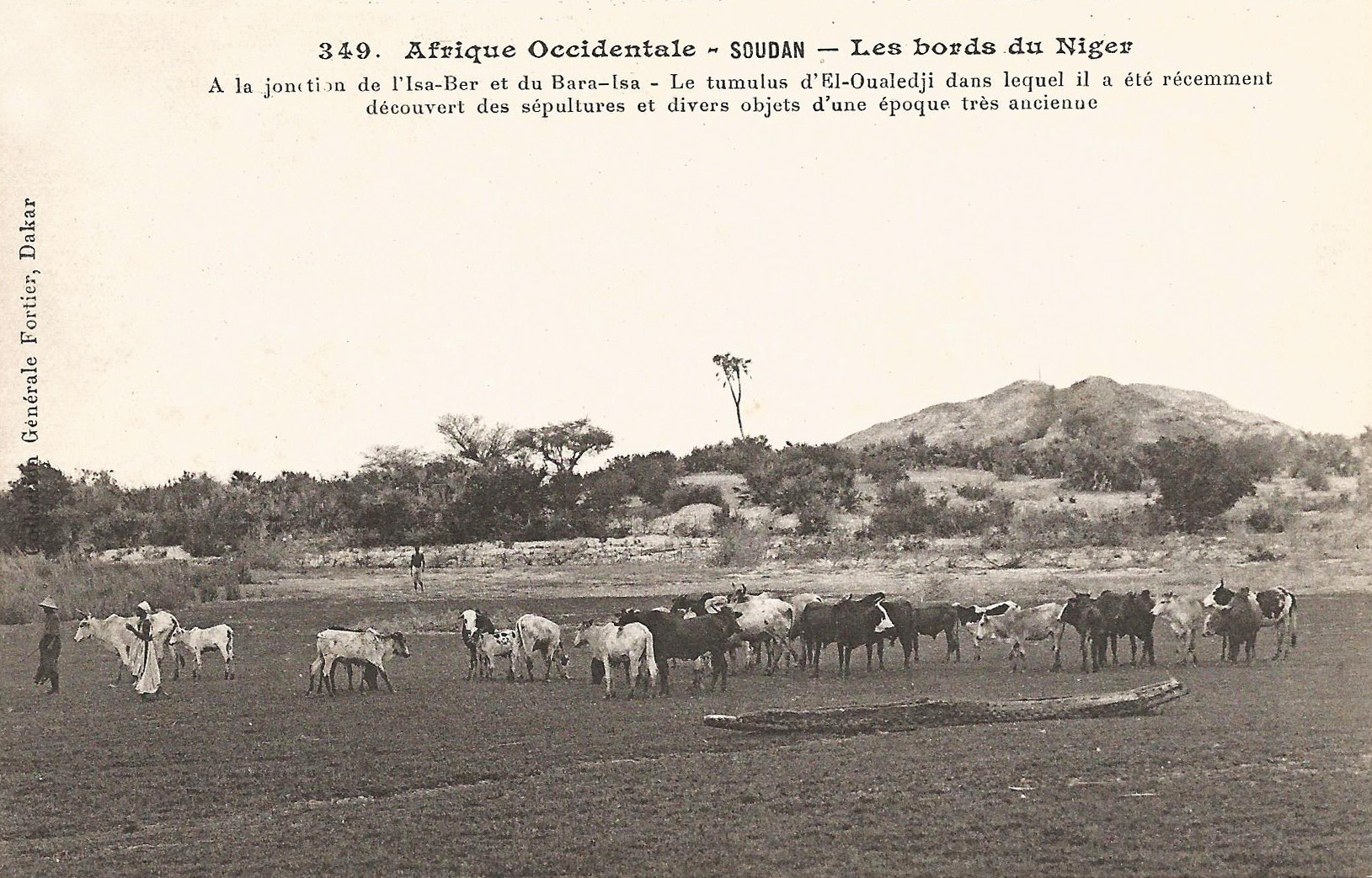 François-Edmond Fortier, Les bords du Niger. A la jonction de l'Isa-Ber et du Bara Isa. Le tumulus d'El-Oualedji dans lequel il a été récemment découvert des sépultures et divers objets d'une époque très ancienne. Afrique Occidentale - Soudan.